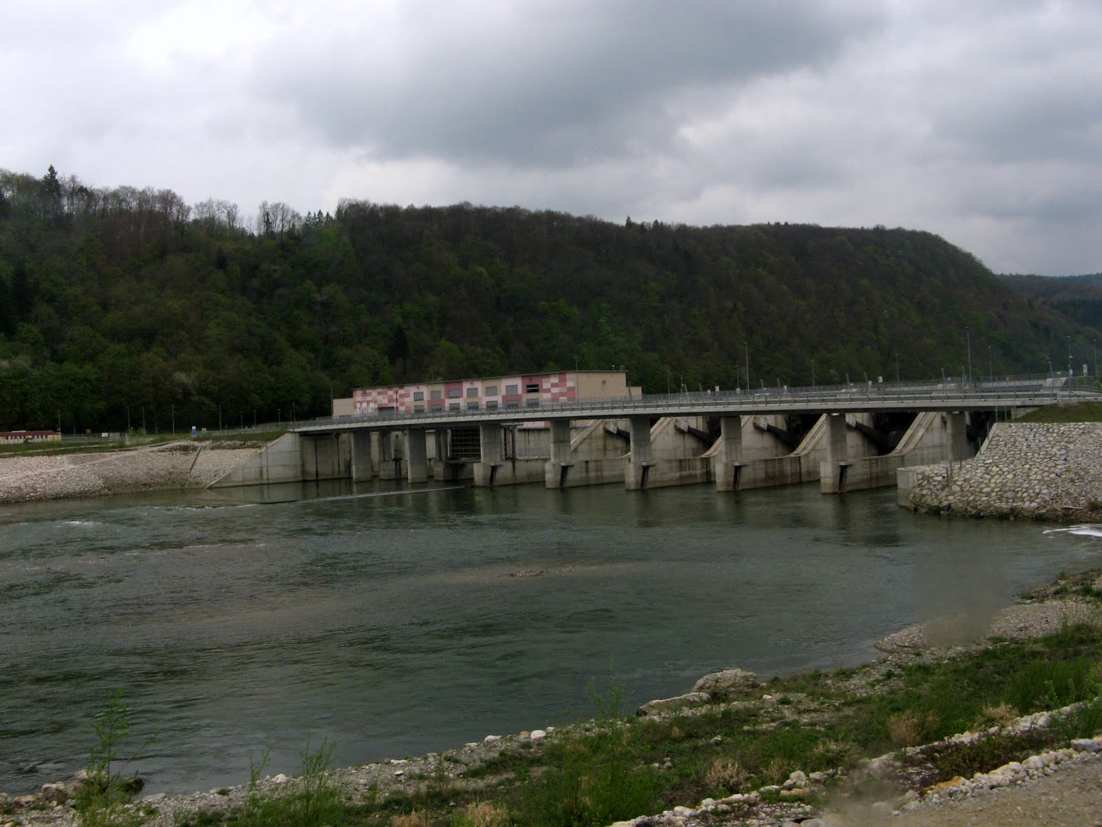 HE Blanca